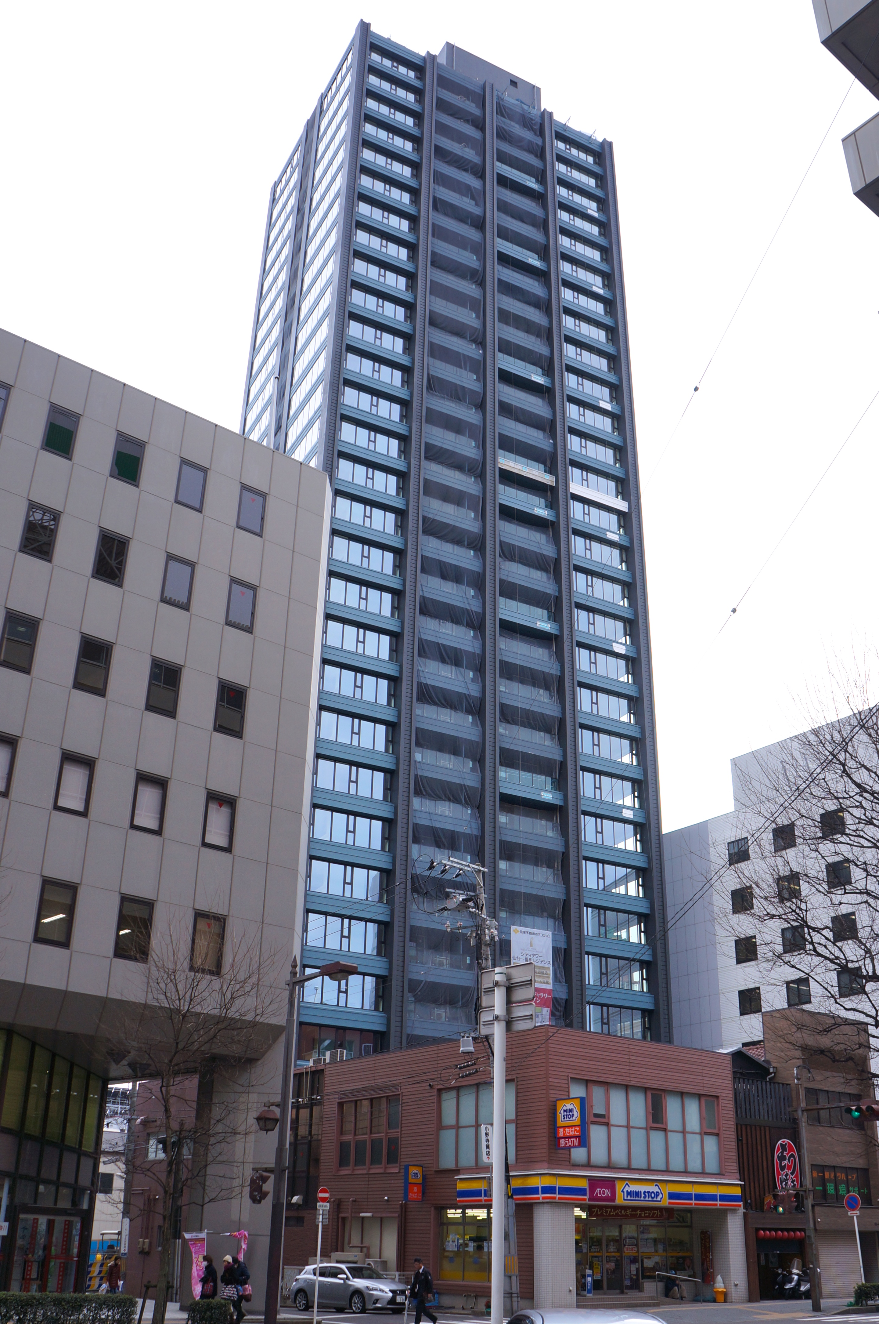 シティタワー仙台一番町